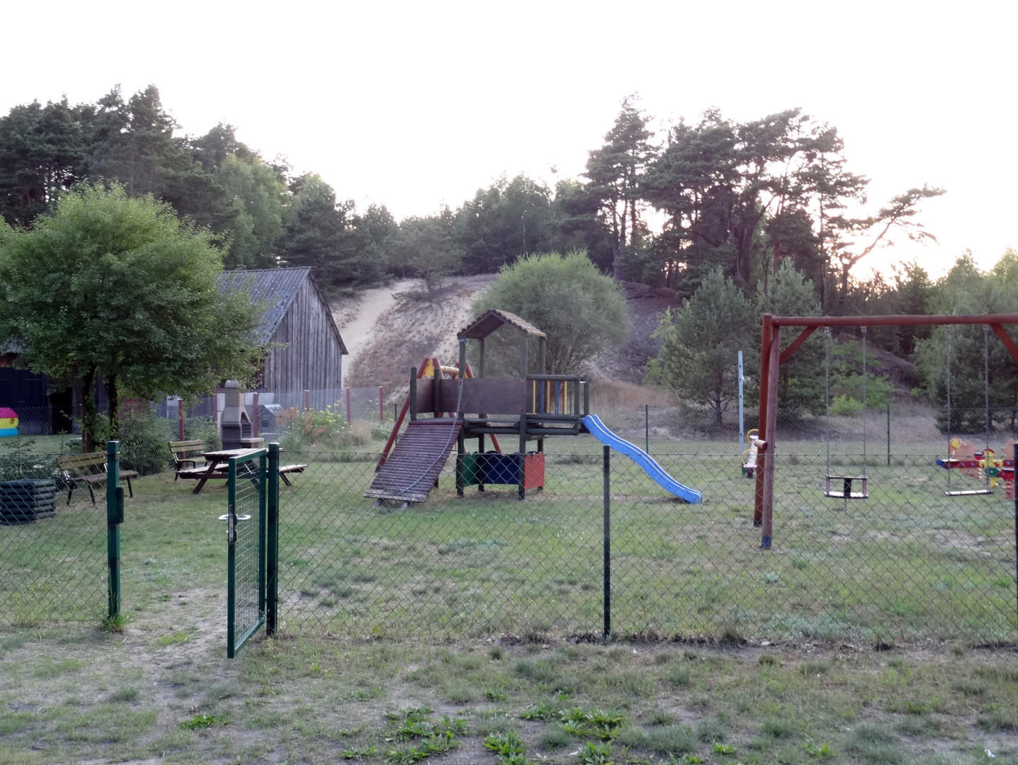 Januszkowo, gmina Nowa Wieś Wielka, powiat bydgoski